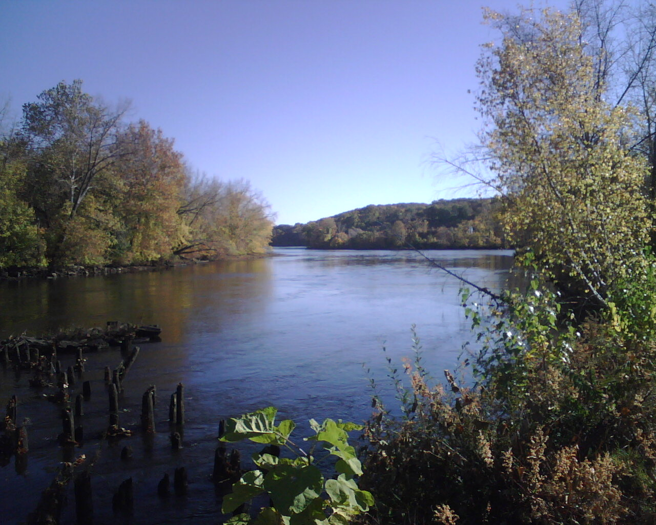 Naugatuck River in Derby